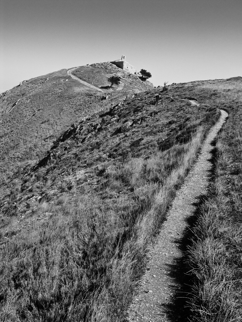 Sant Marti de la Roca, Camélas, Pyrénées-Orientales